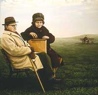 Omslaget till Måltid. Målning av Tage Åsén